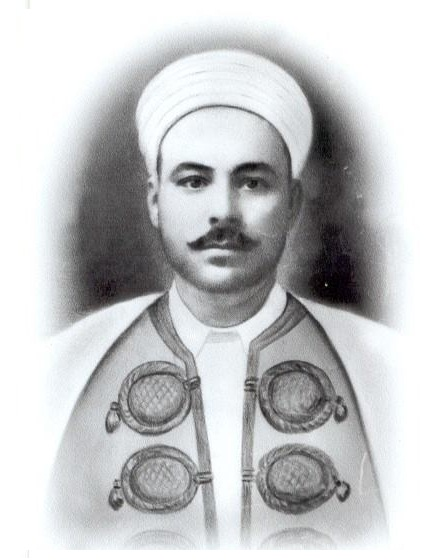 محمّد الصّـــادق الشطــي